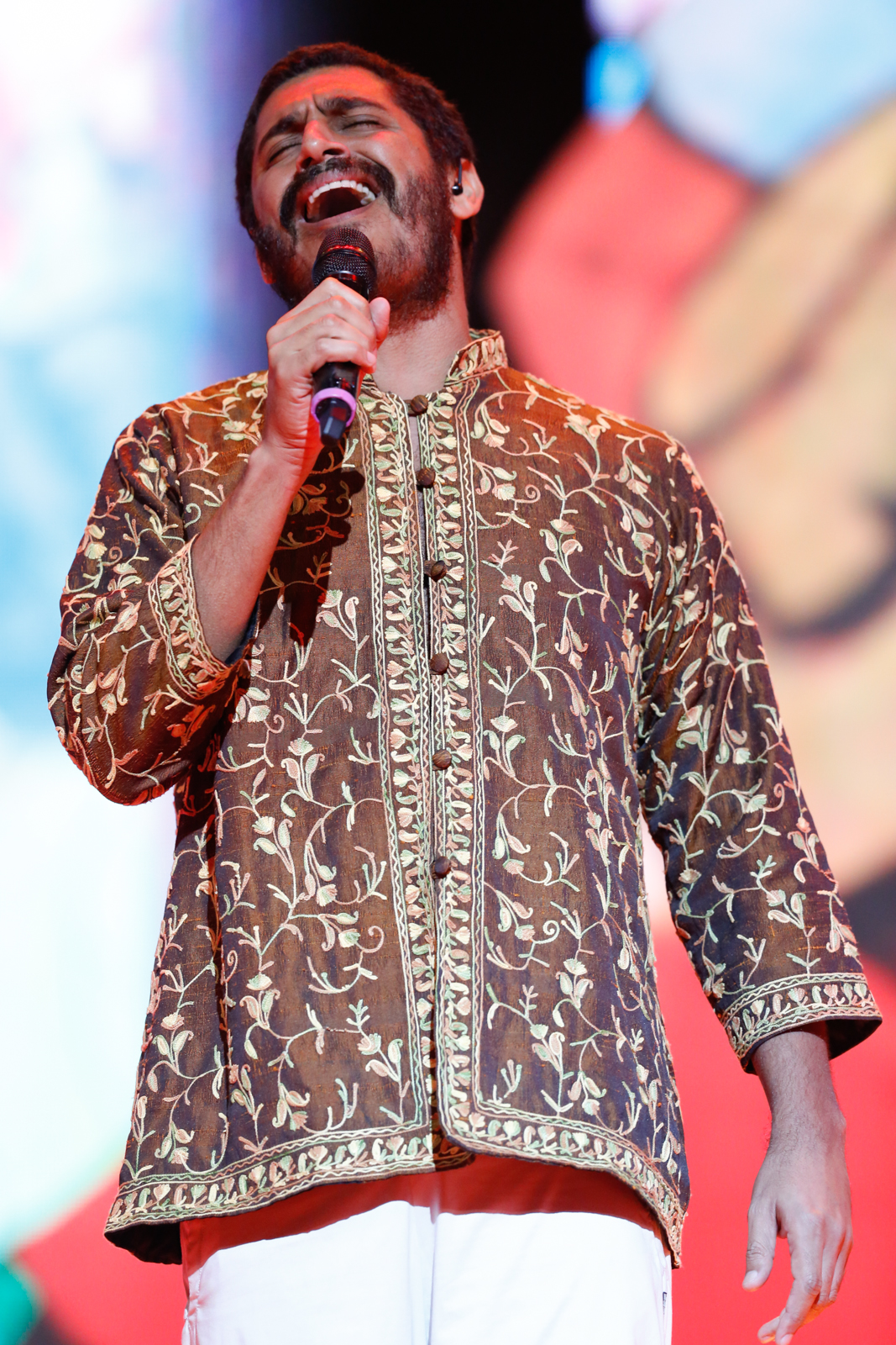 Criolo durante o 25o Premio da Musica Brasileira no Theatro Municipal. Foto: Roberto Filho (14/05/14)